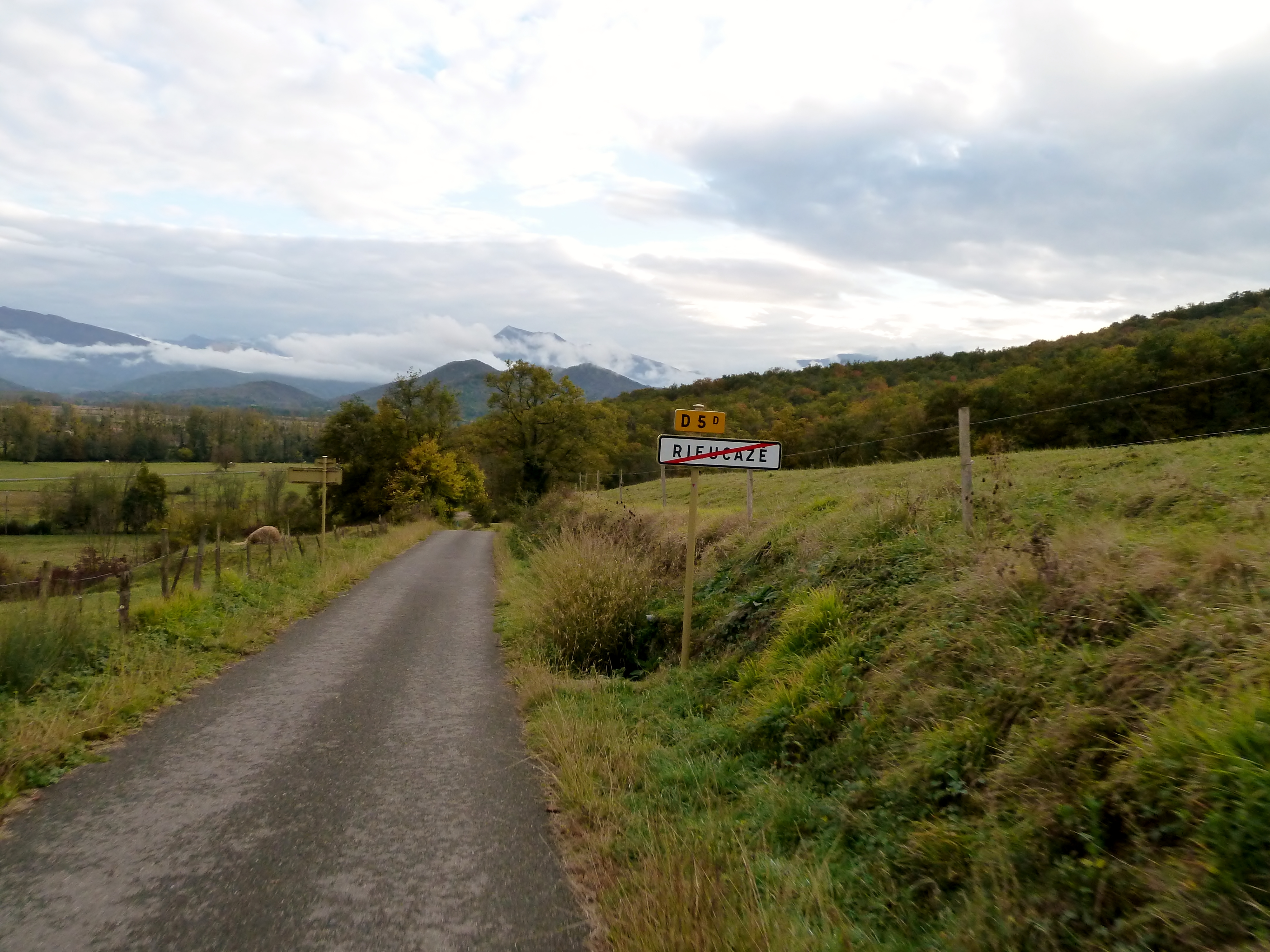 Sortie de Rieucazé